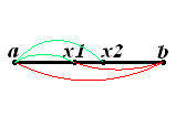 Иллюстрация к методу золотого сечения